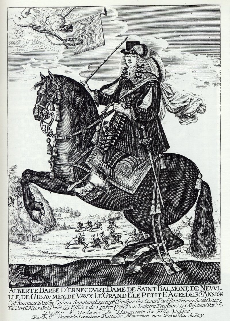 Alberte-Barbe d'Ernécourt (1607-1660) gravure d'après le tableau de Claude Deruet